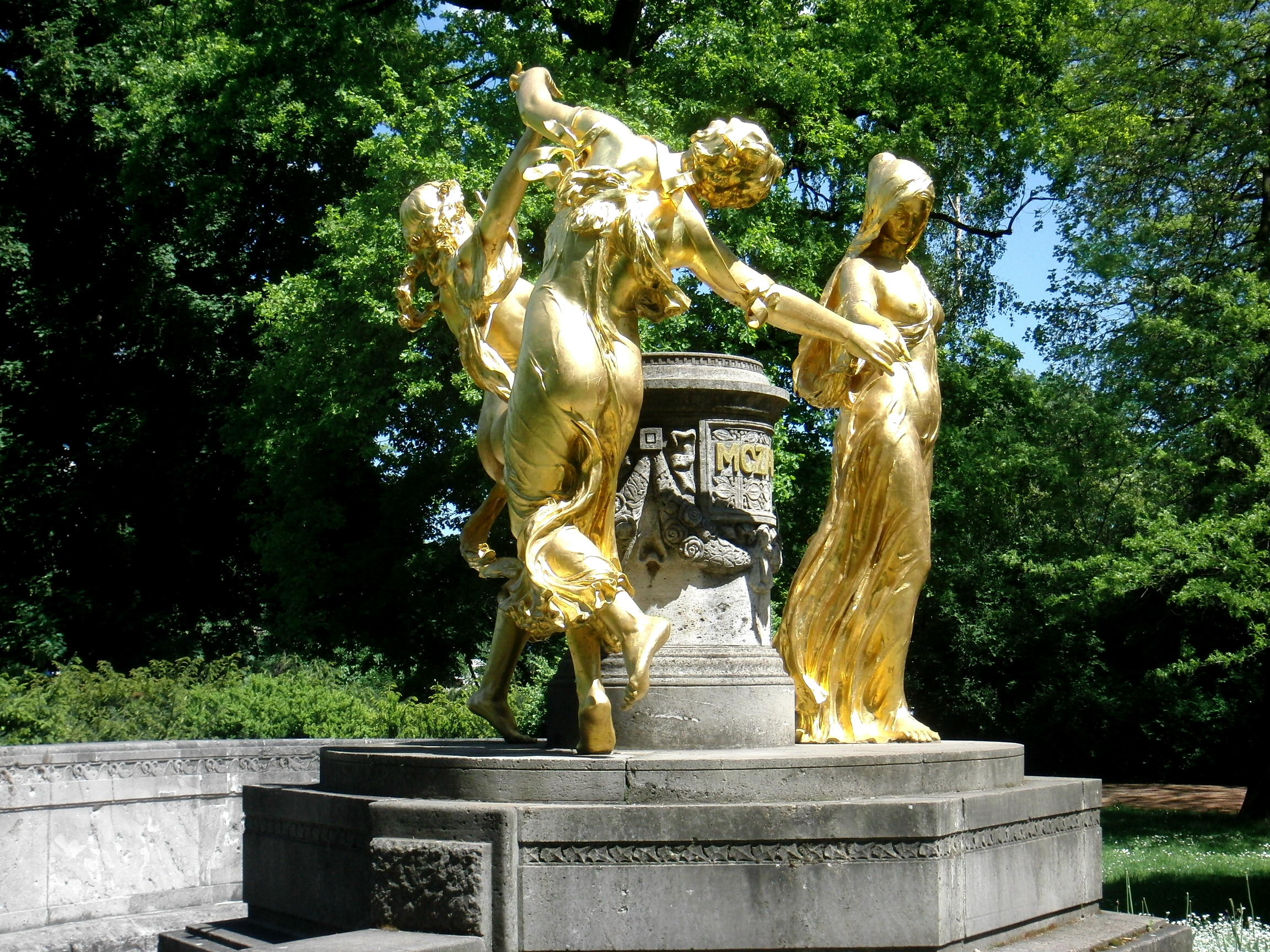 Mozartbrunnen, geschaffen vom Bildhauer Hermann Hosaeus. Stele mit Kartusche „Mozart“ wird umtanzt von drei Musen „Ernst, Anmut und Heiterkeit“. 1945 total zerstört Bruchstücke eingelagert und von 1988 bis 1991 vom Bildhauer Eberhard Wolf rekonstruiert